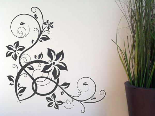 Wandtattoo Stilvolles Ornament